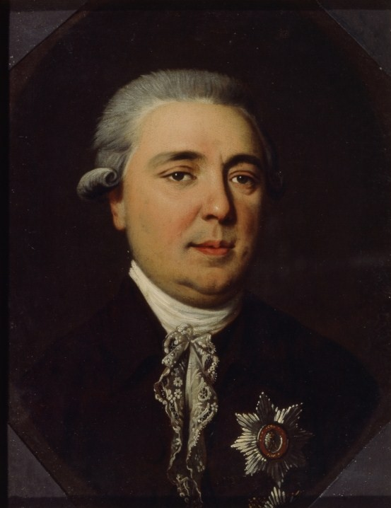 Граф Александр Романович Воронцов (1741—1805) — государственный канцлер